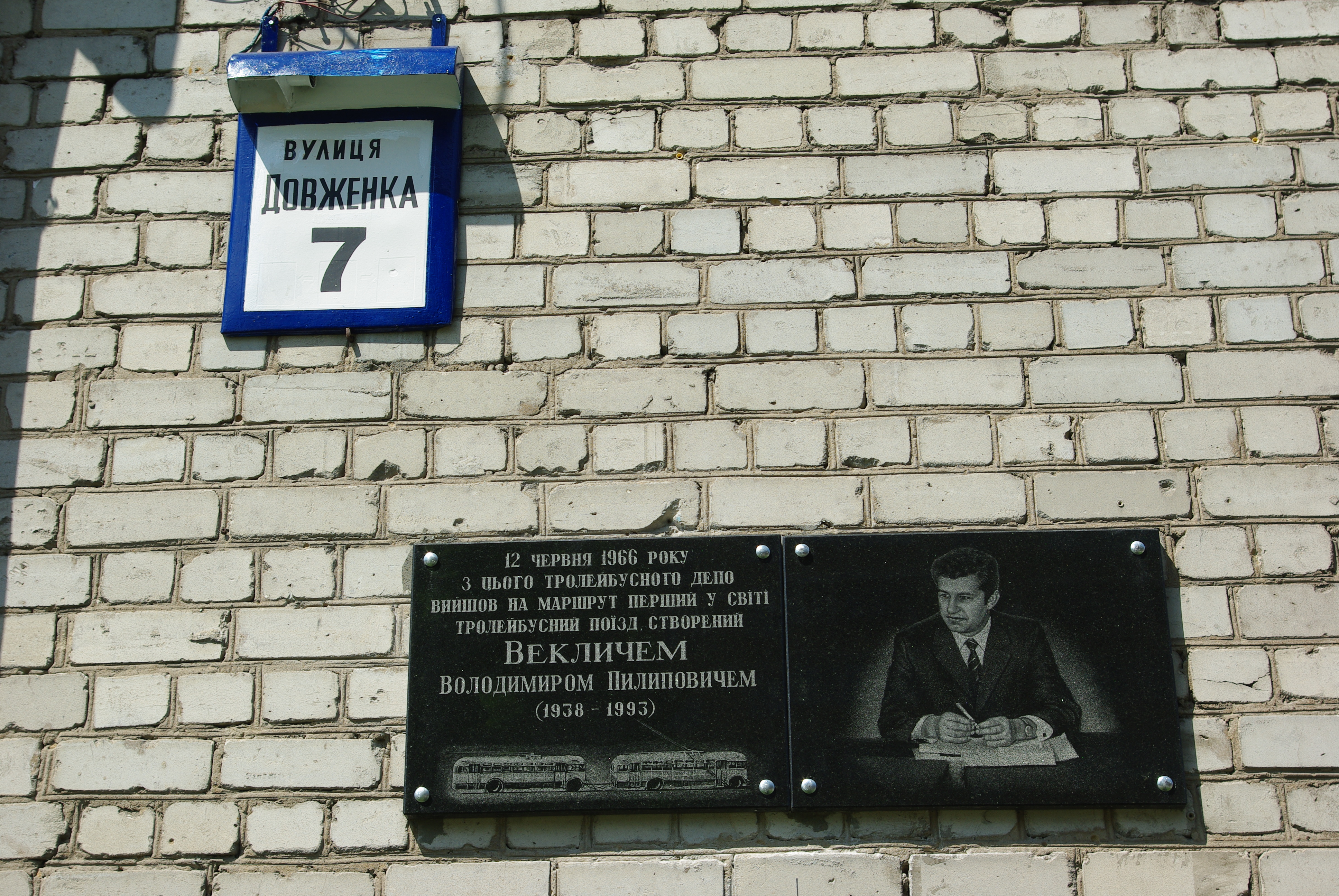 Мемориальная доска Владимиру Векличу в киевском депо на Довженко 7